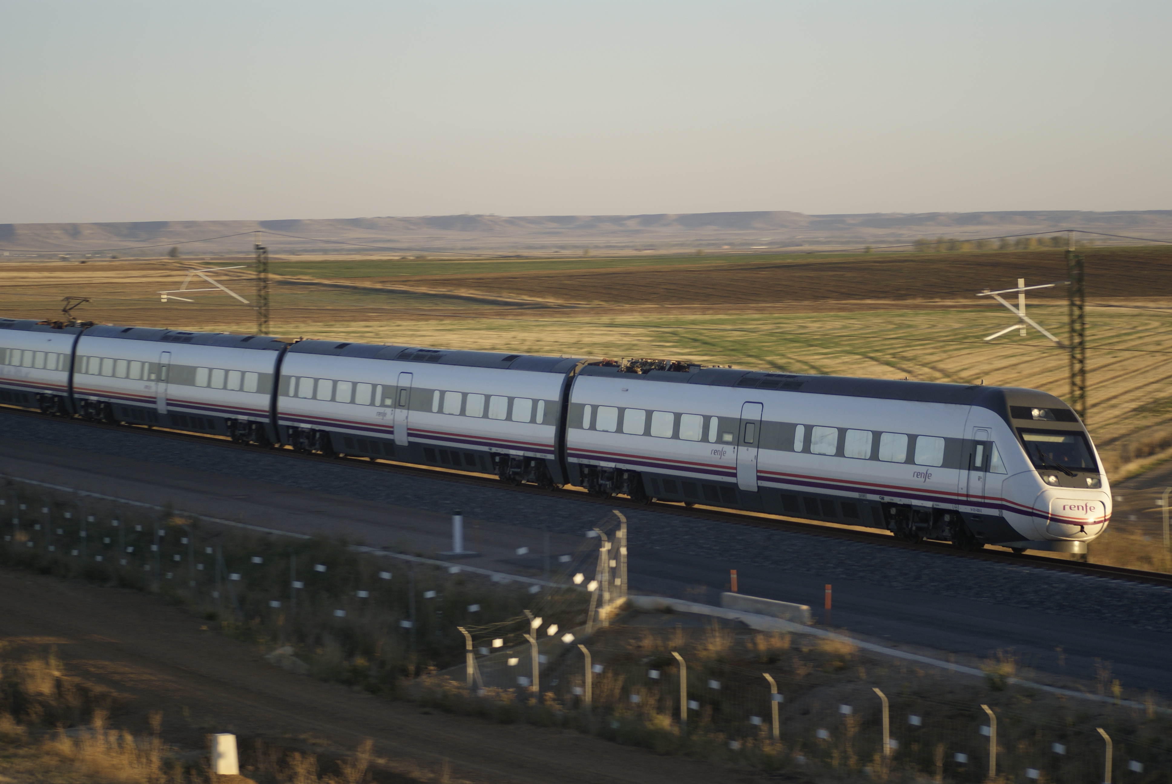 Servicio Media Distancia en un tren Serie 121 de Renfe circulando por la Línea de alta velocidad Valladolid-Palencia-León en el término municipal de Paredes de Nava.